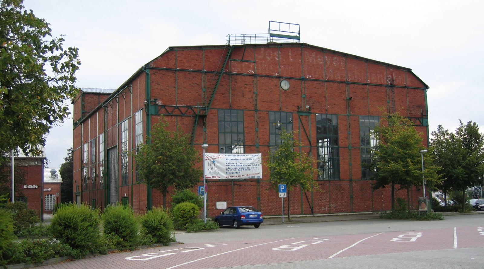 Kultur- und Veranstaltungszentrum Papenburg „Forum Alte Werft“ (ehemalige Produktionsstätte der Meyer-Werft) in Papenburg.